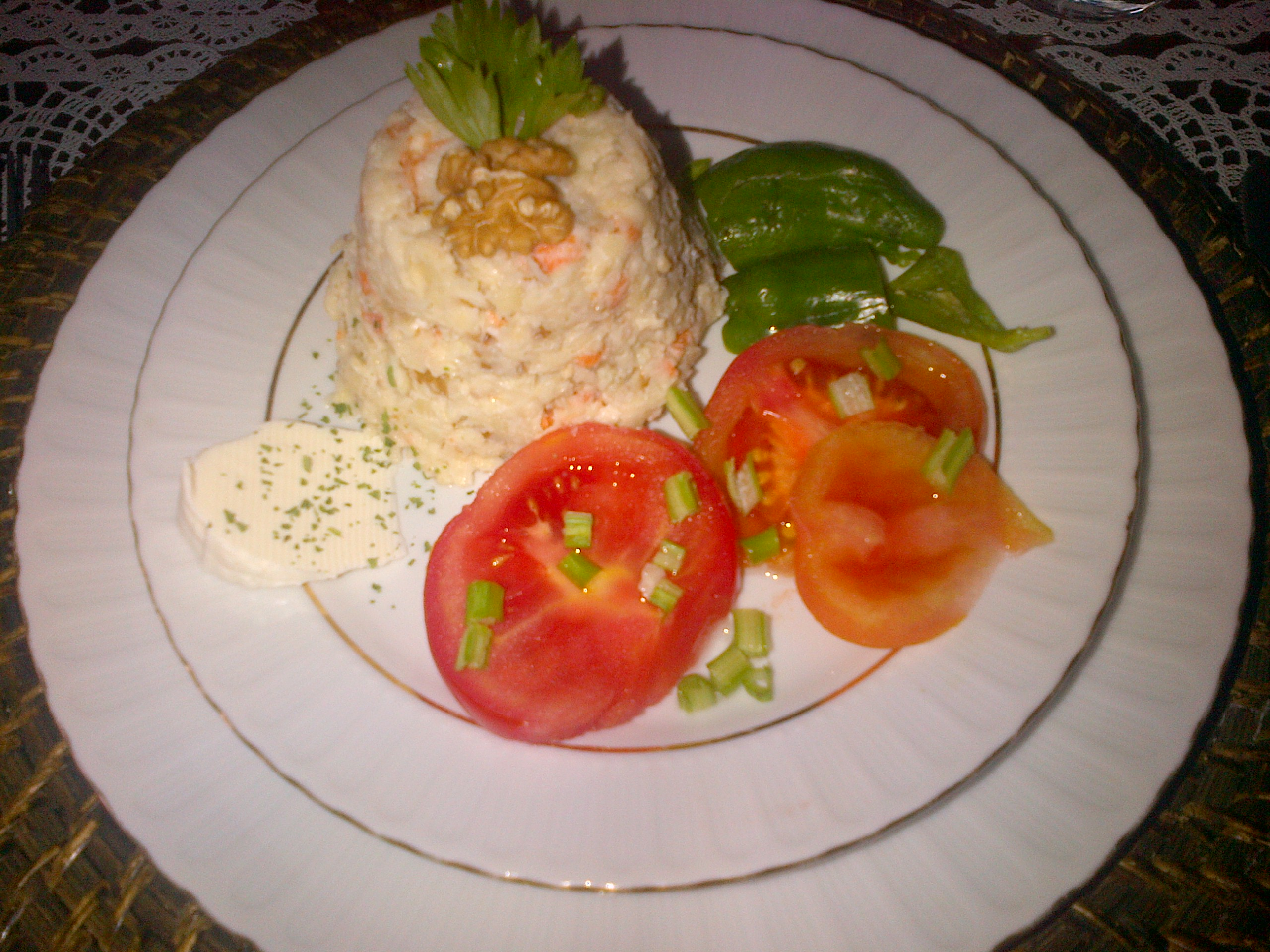 Amanida de bulb d'api a la cuina turca, decorada amb un nou i acompanyada de formatge, pebrots i tomaquets.